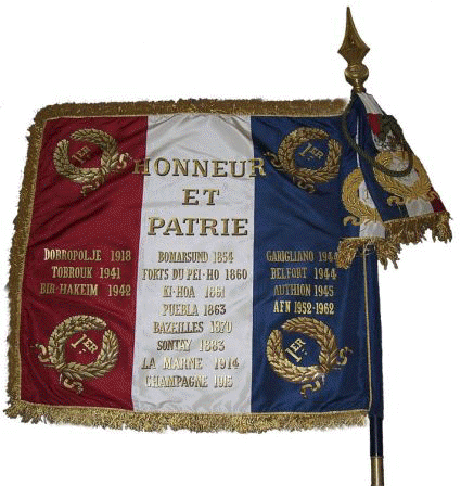 photo du drapeau du 1er rima